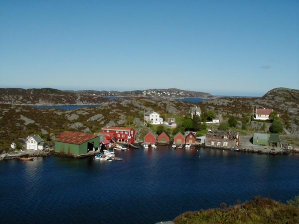 Misje